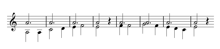 Description : Bourdon supérieur Source : Personnelle Licence : GFDL